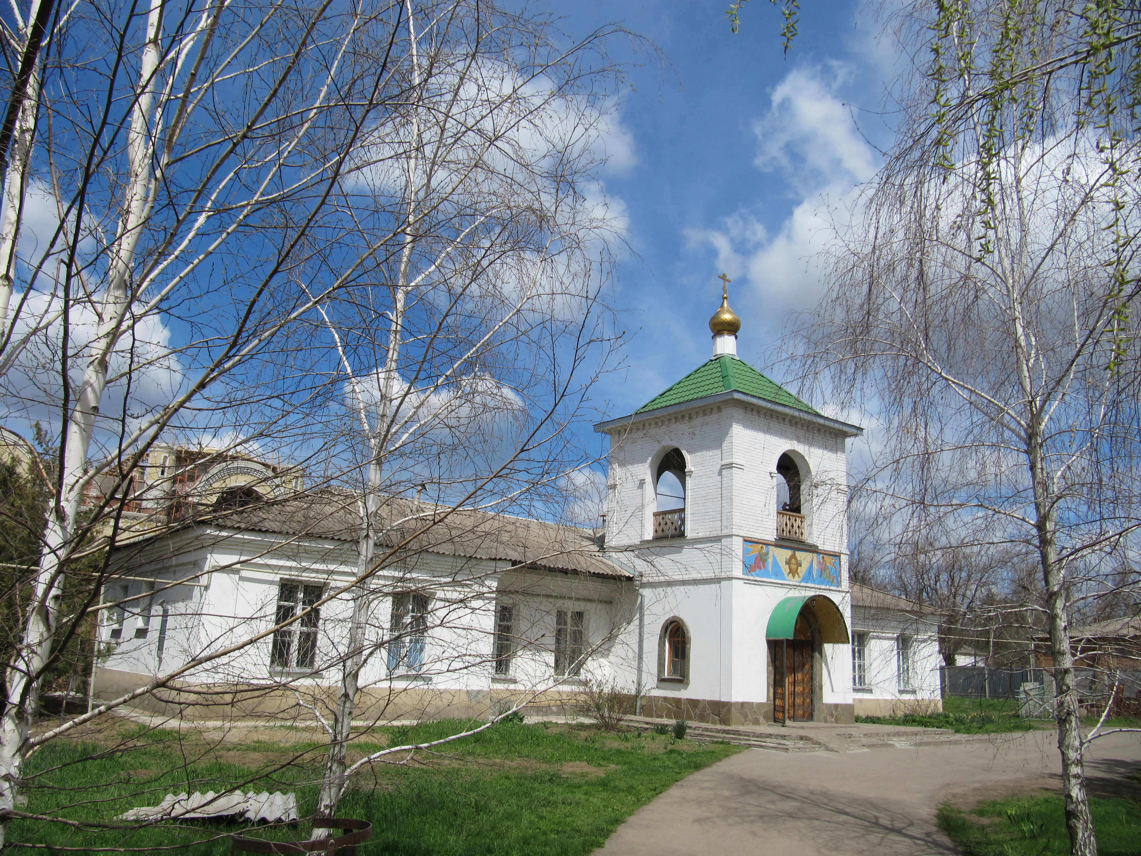 Церковь святого Архангела Михаила, Городовиковск, Калмыкия